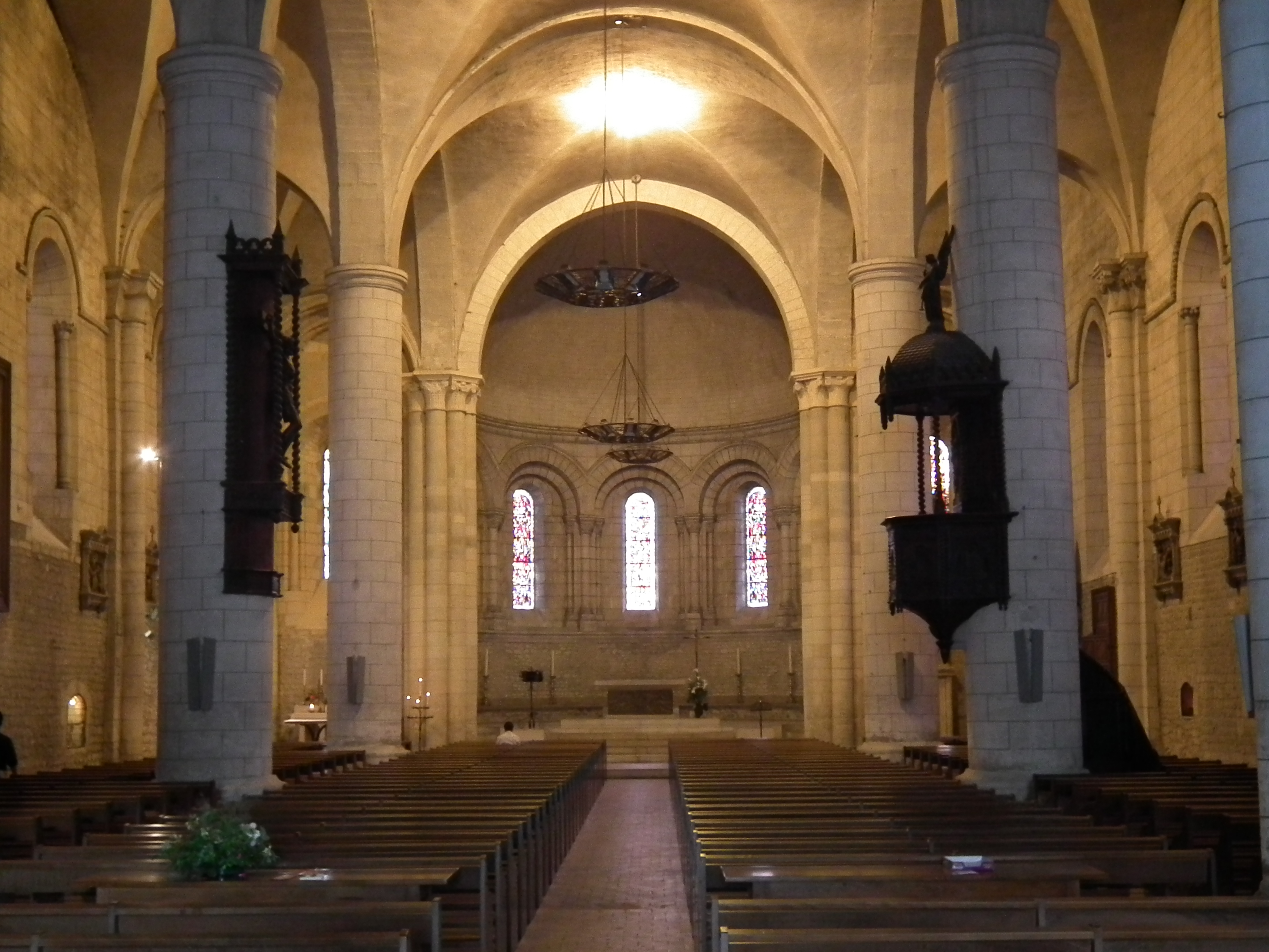 Intérieur de l'église Saint-Mathias de Barbezieux